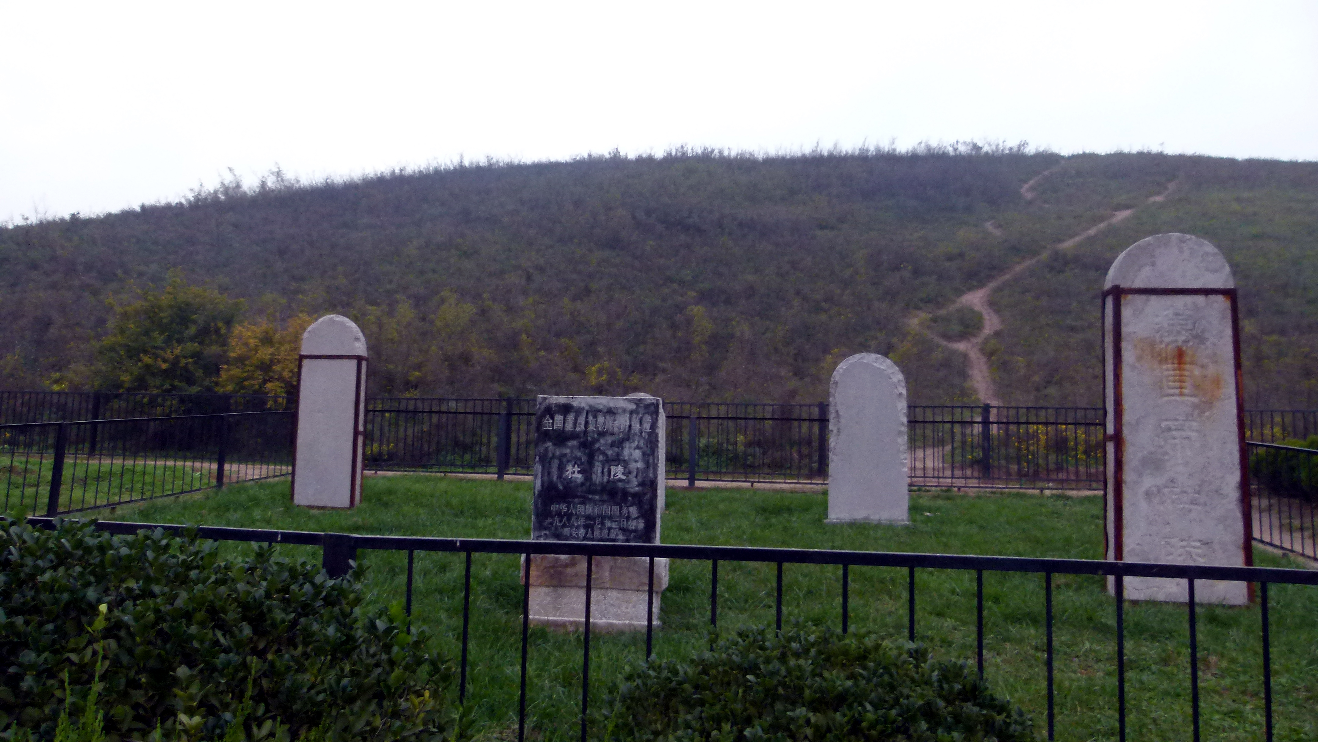 Han Duling - Mausoleum des Kaisers Xuan Di